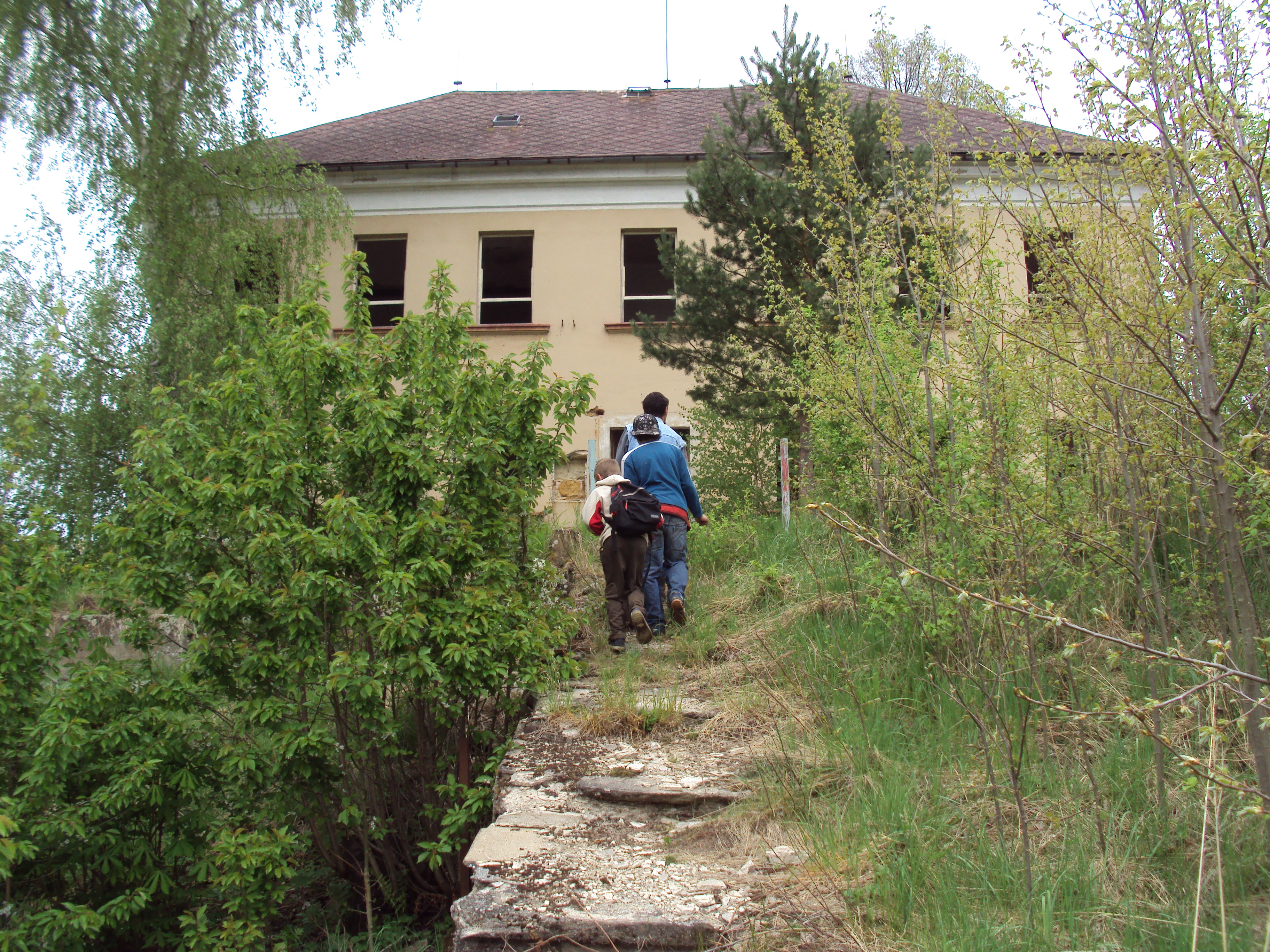 Cesta k bývalé škole v Lasvicích, části Zákup. Objekt byl na podzim 2010 zbořen